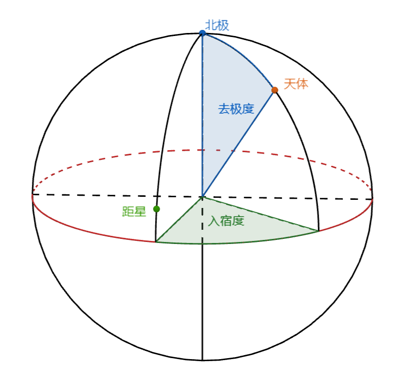 中国传统天球赤道坐标系。红色为天赤道圈。绿色点为距星，共二十八颗作为坐标，即二十八宿。蓝色点为天北极。计算橙色天体的位置时，用入宿度（绿色扇形的角度）表示赤经，用去极度（蓝色扇形的角度）表示赤纬。